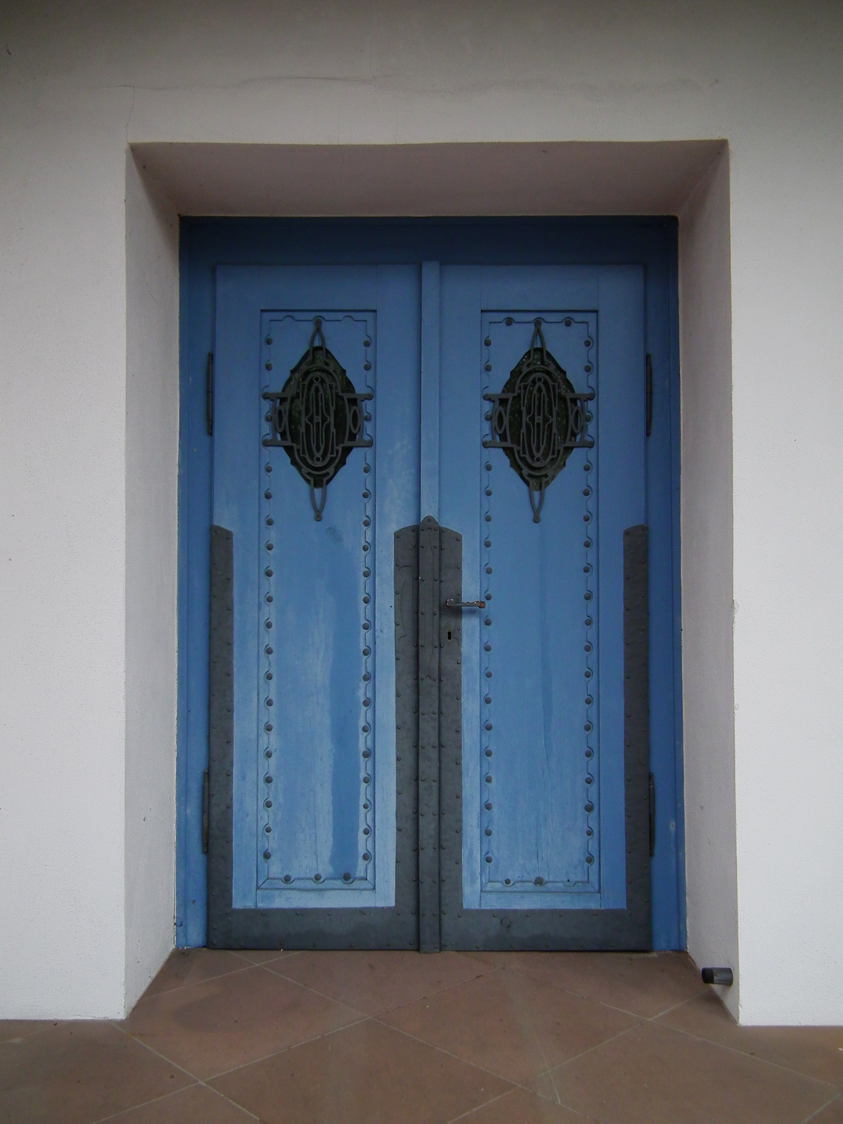 Gustav-Adolf-Kirche in Affolterbach, einem Ortsteil von Wald-Michelbach (Kreis Bergstraße, Hessen, Deutschland)